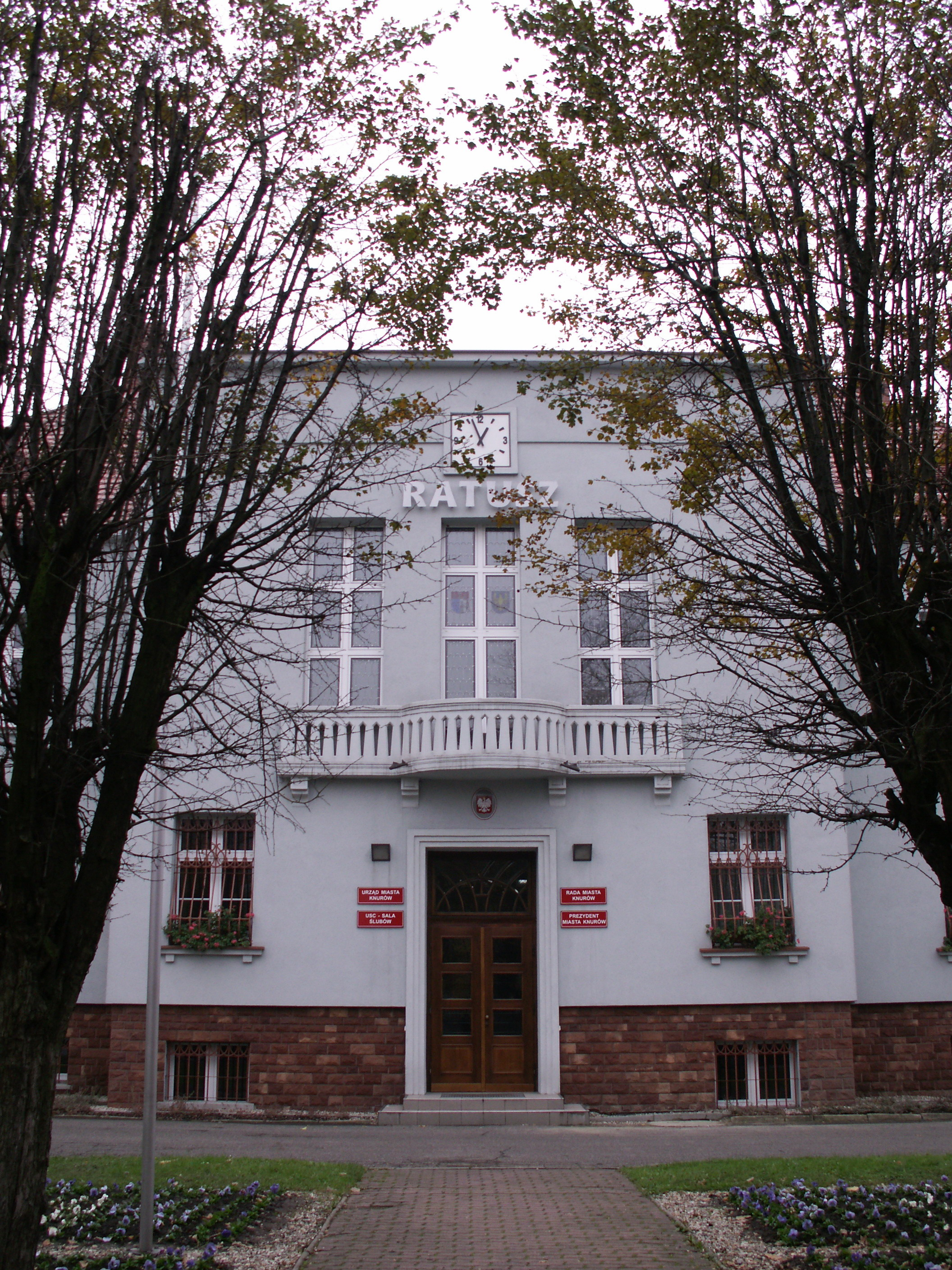 Knurowski ratusz, a zarazem siedziba Rady miasta Knurów.